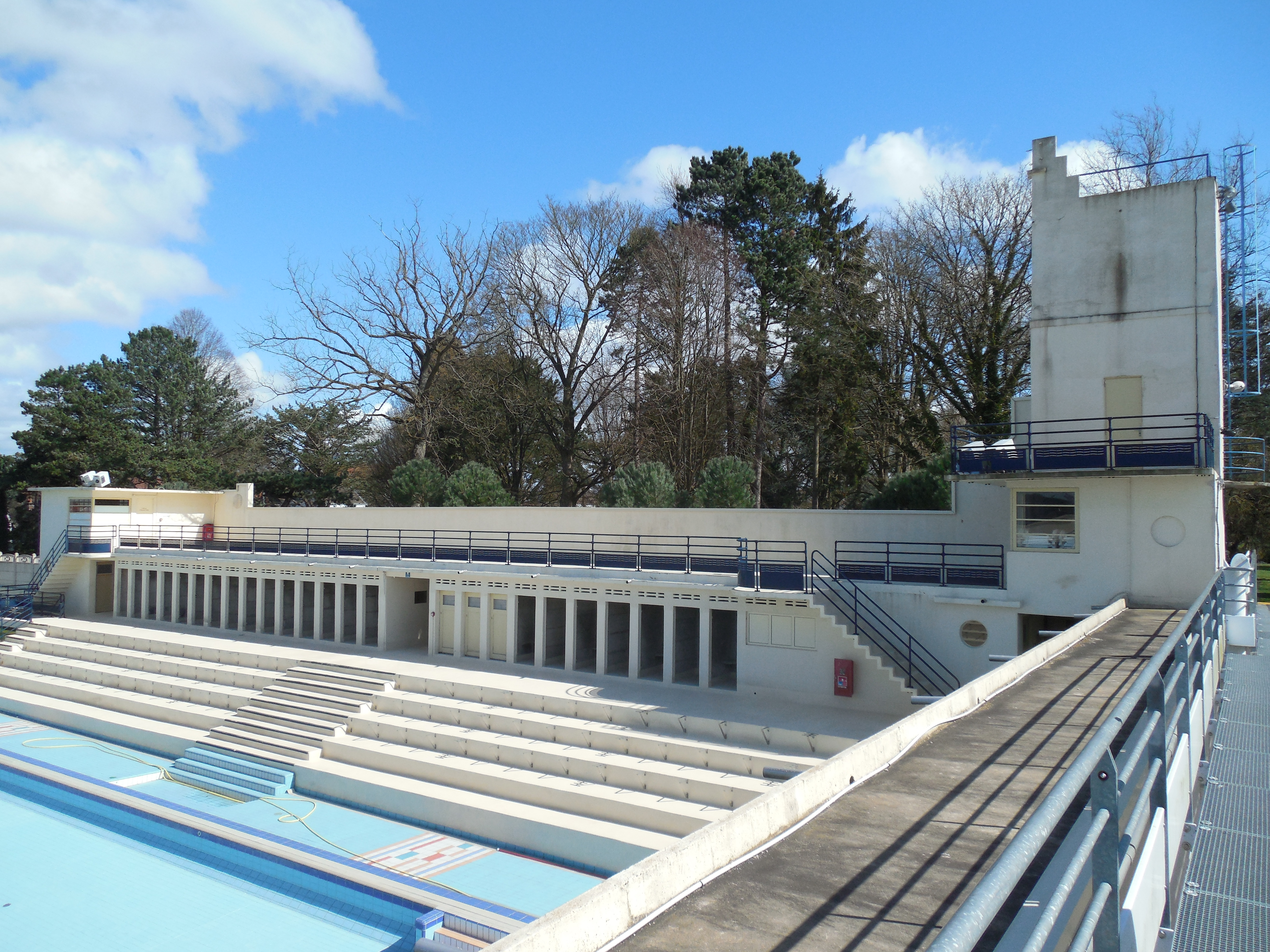 Vue de la passerelle. Gradins, cabines.